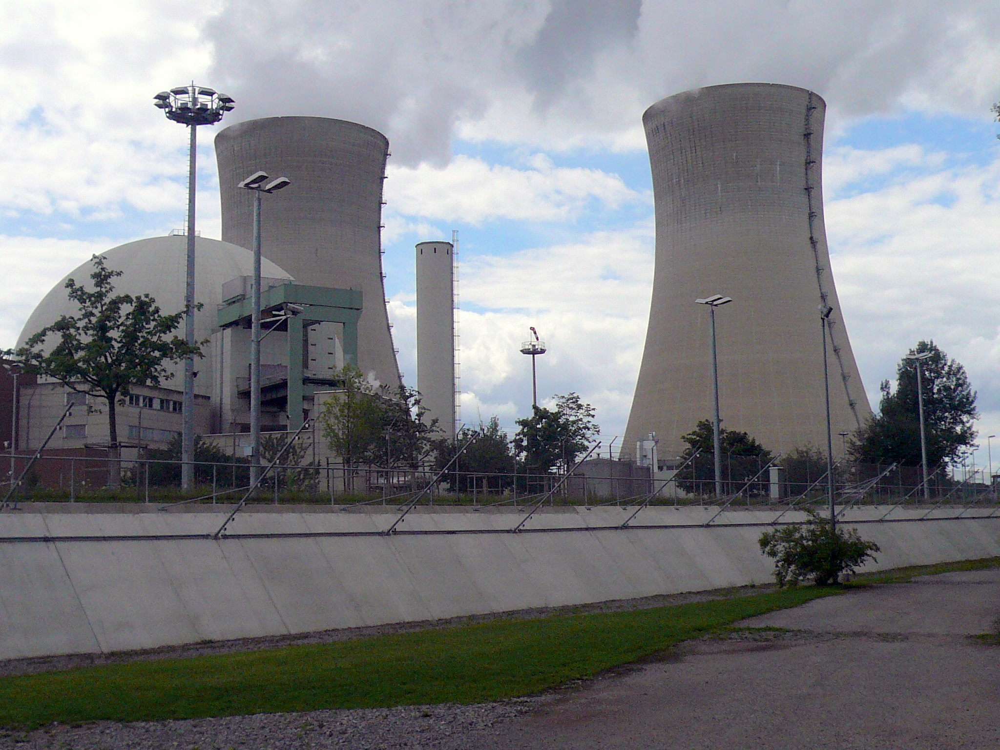 Kernkraftwerk Grafenrheinfeld